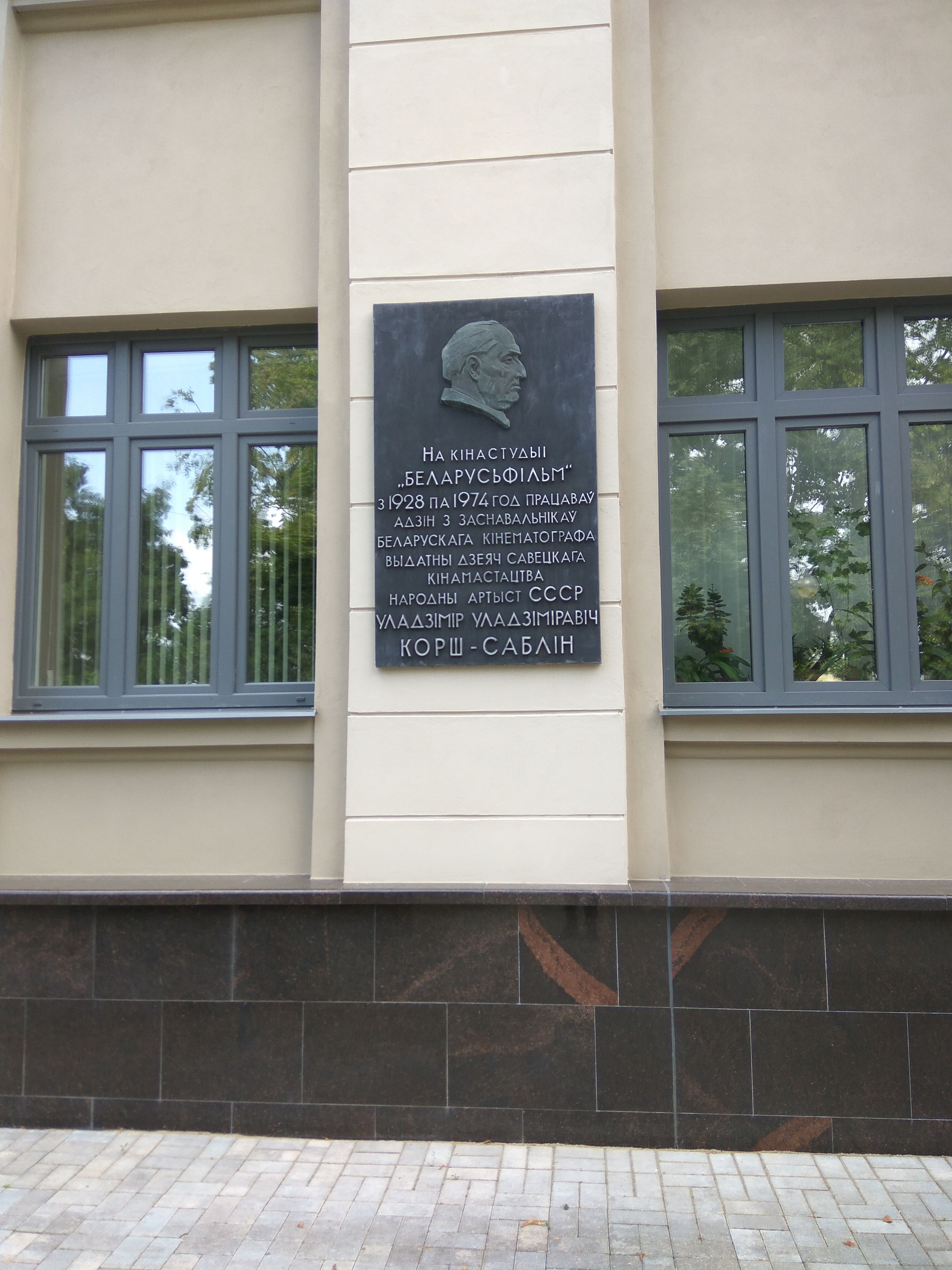 Мінск. Галоўны корпус Беларусьфільм. Уладзімір Корш-Саблін